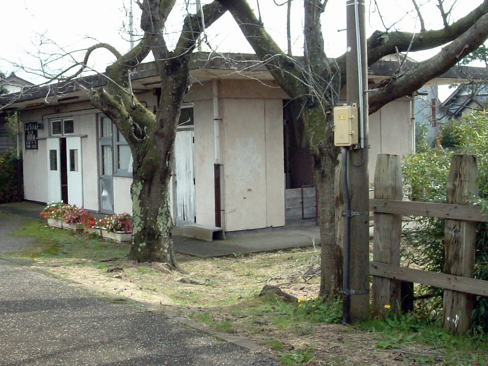 のと鉄道能登線正院駅